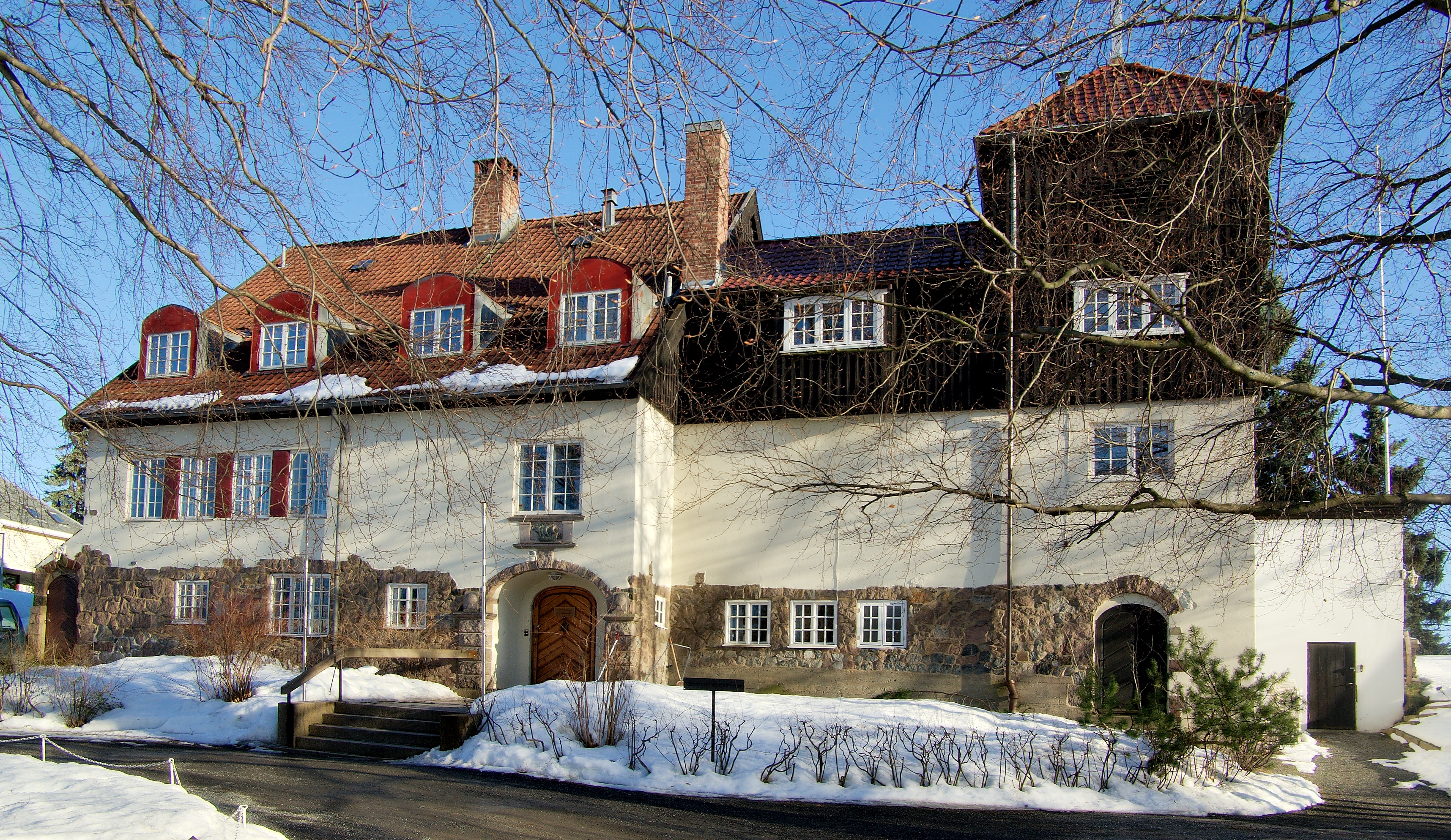 Bygdøy sjømannskirke